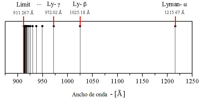 Distribución de las líneas de absorción y emisión de la serie de Lyman. Modificada al español del original en inglés.